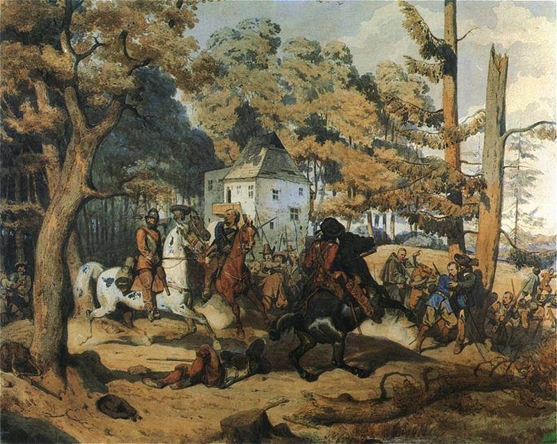 Utarczka ze Szwedami by Artur Grottger